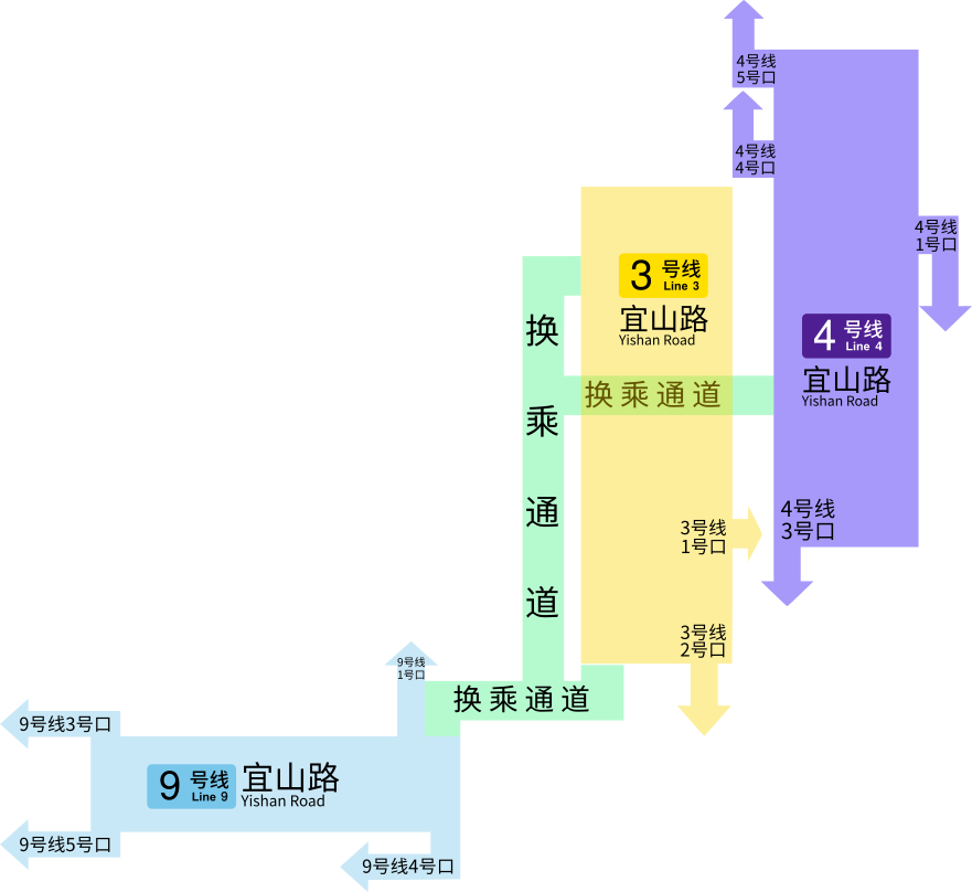 宜山路站站层图